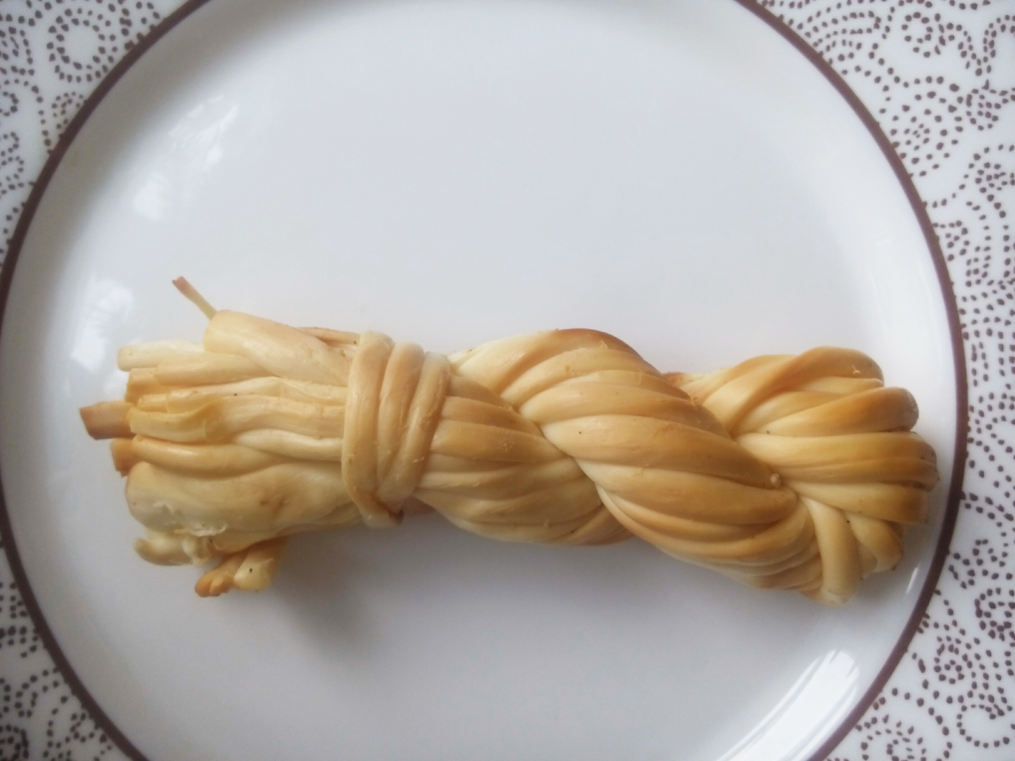 Копчений сир косичка, Чернігів